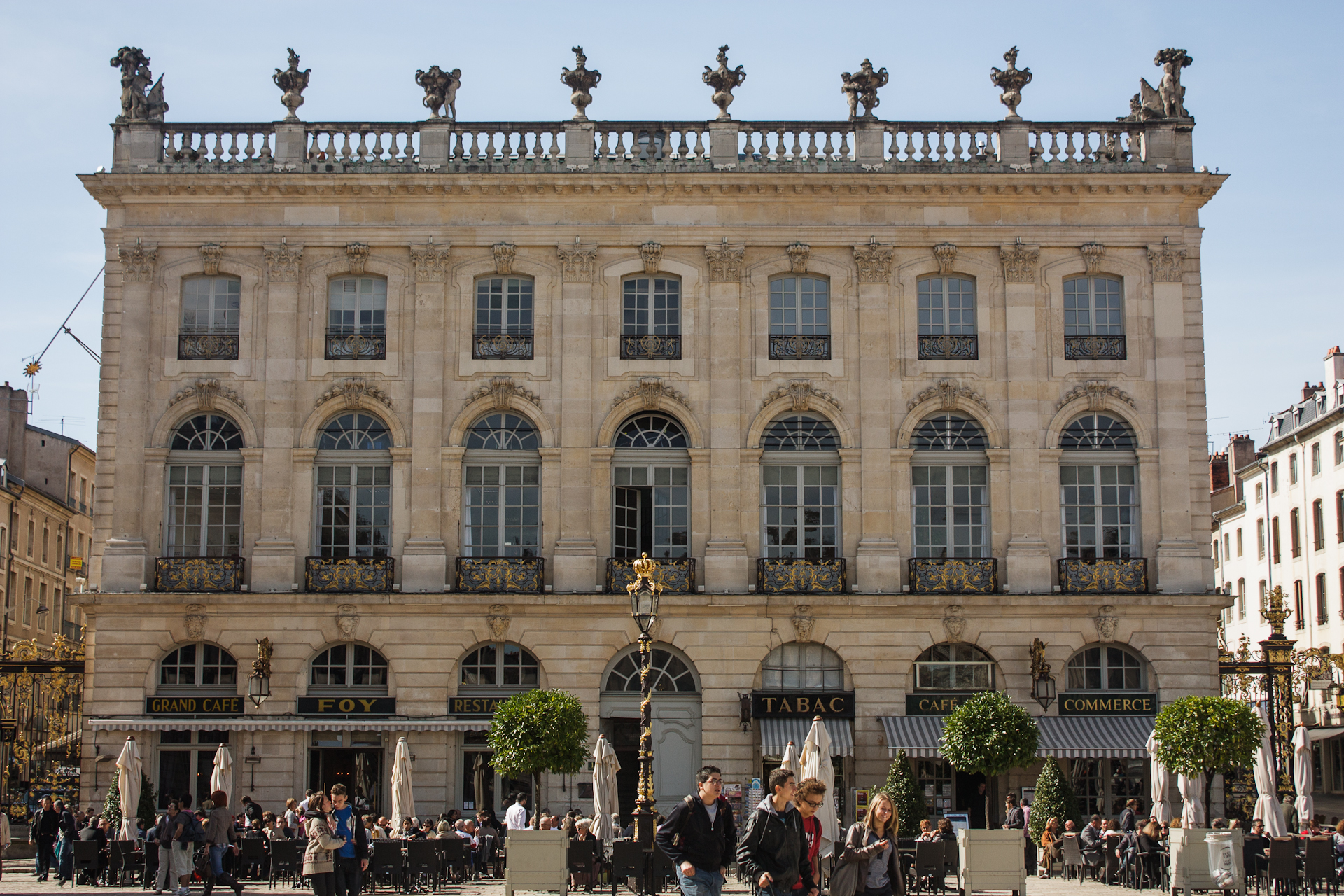 Immeubleélévation, toiture, 1 place Stanislas (Classé, 1929)Pavillon Jacquet sur la Place Stanislas à Nancy